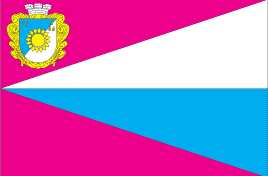 Прапор Верхньорогачицького району